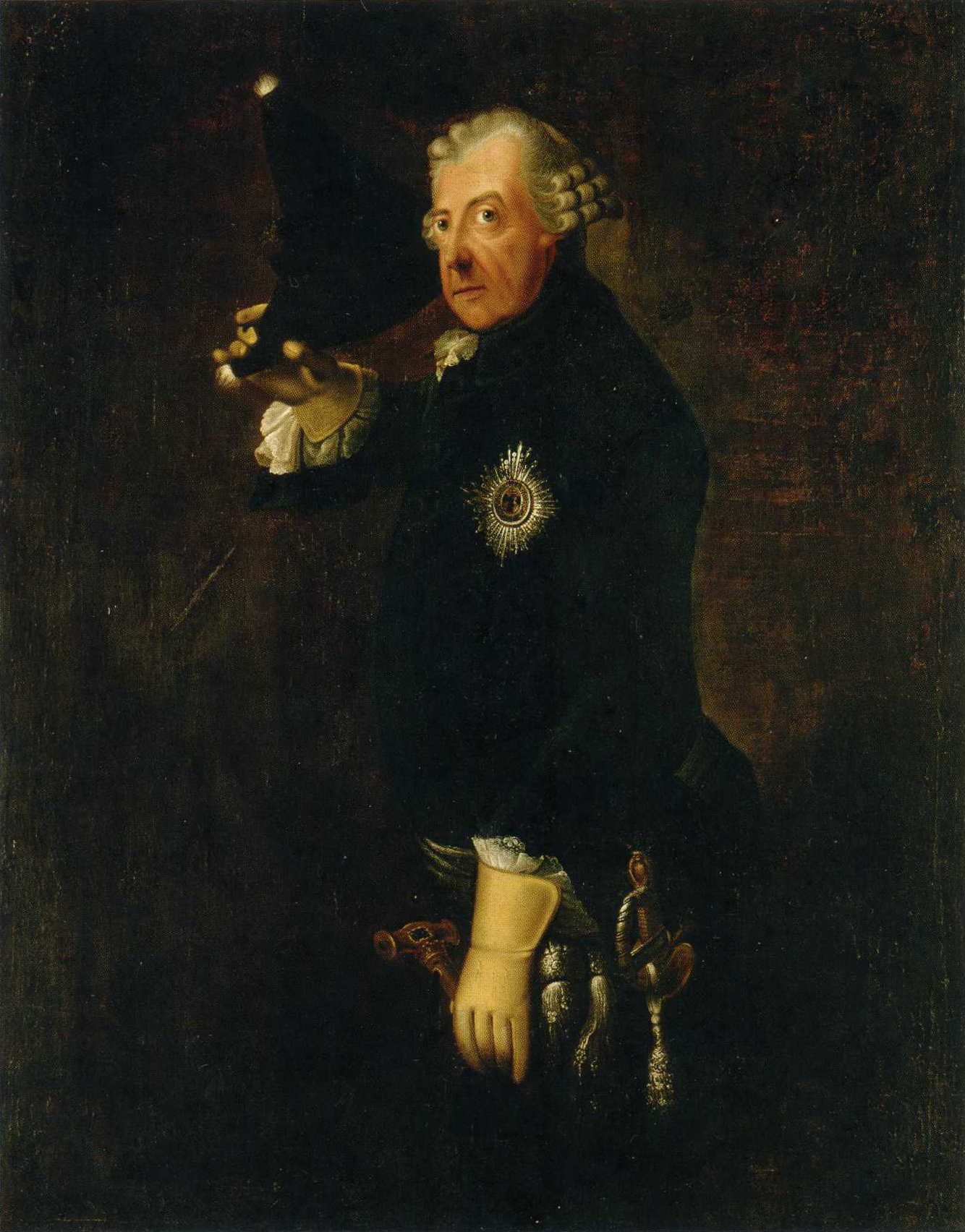 Otsiherero: Friedrich II., mit Dreispitz, grüßend. Öl auf Leinwand, 126,5 x 94,3 cm. Stiftung Preußische Schlösser und Gärten, GK I 30089, erworben mit Mitteln der Stiftung Deutsche Klassenlotterie Berlin